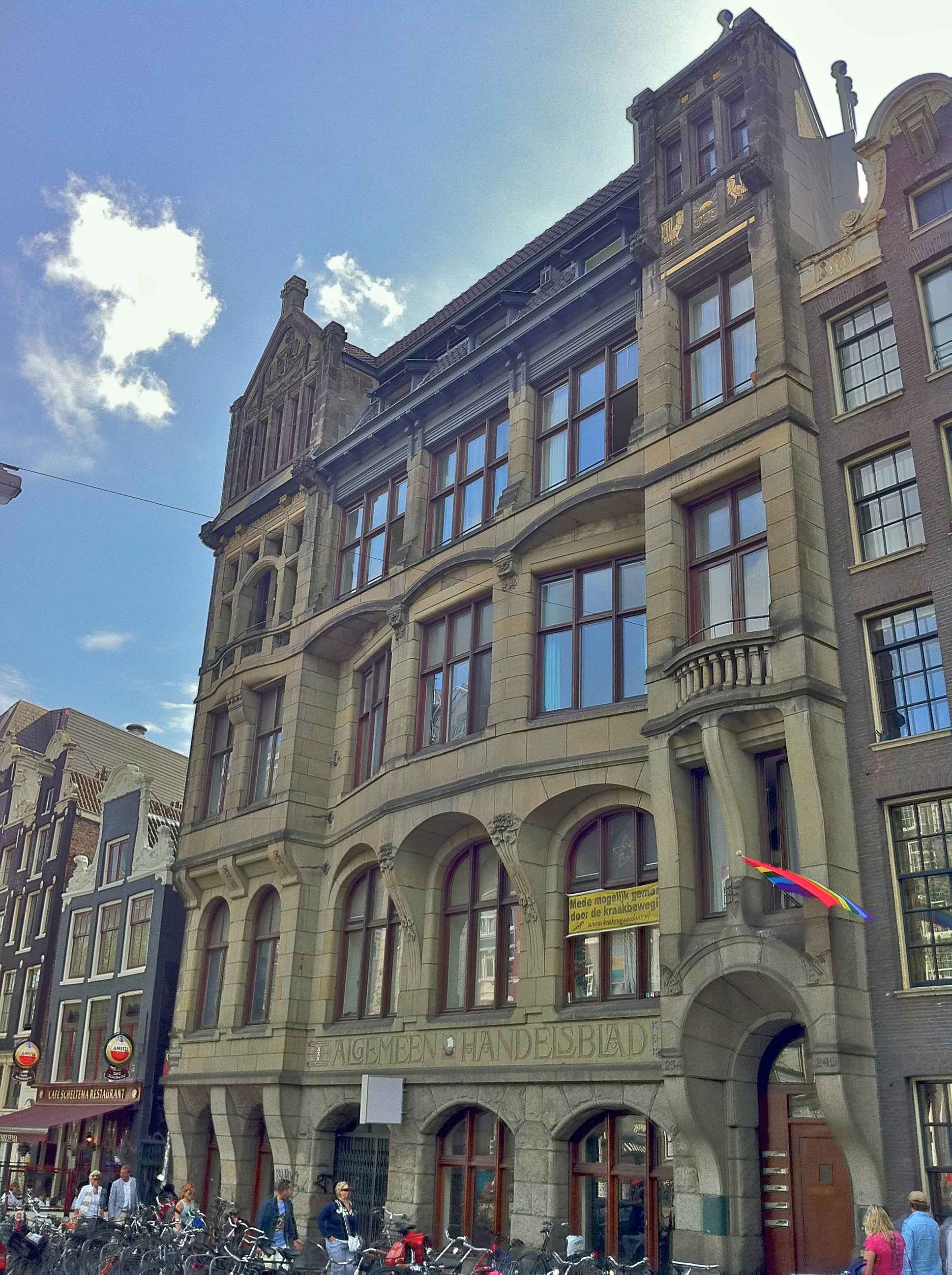 Amsterdam - Algemeen Handelsblad NZ Voorburgwal